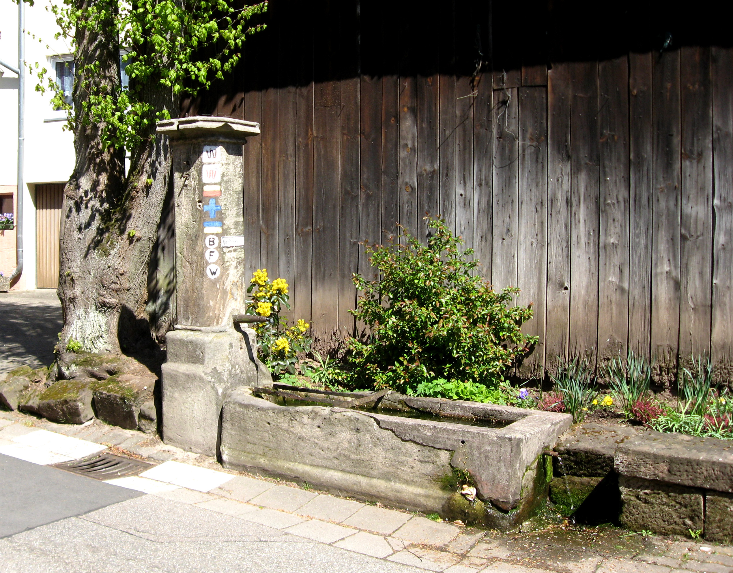 Laufbrunnen in der Herrengasse in Wilgartswiesen, gegenüber Haus Nr. 15